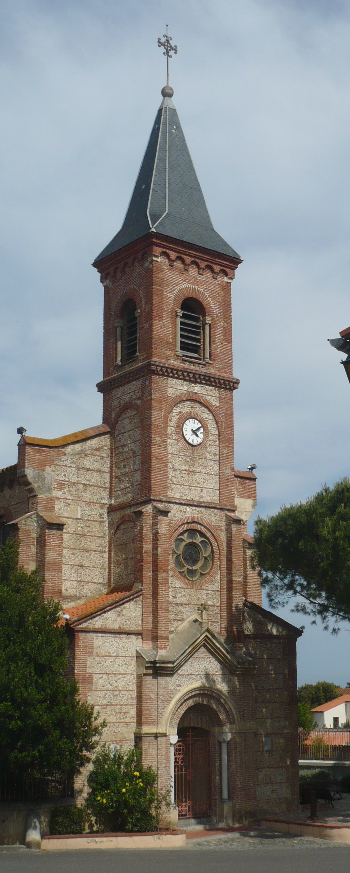 Clocher de l'église Saint-Christophe à Corneilla-del-Vercol